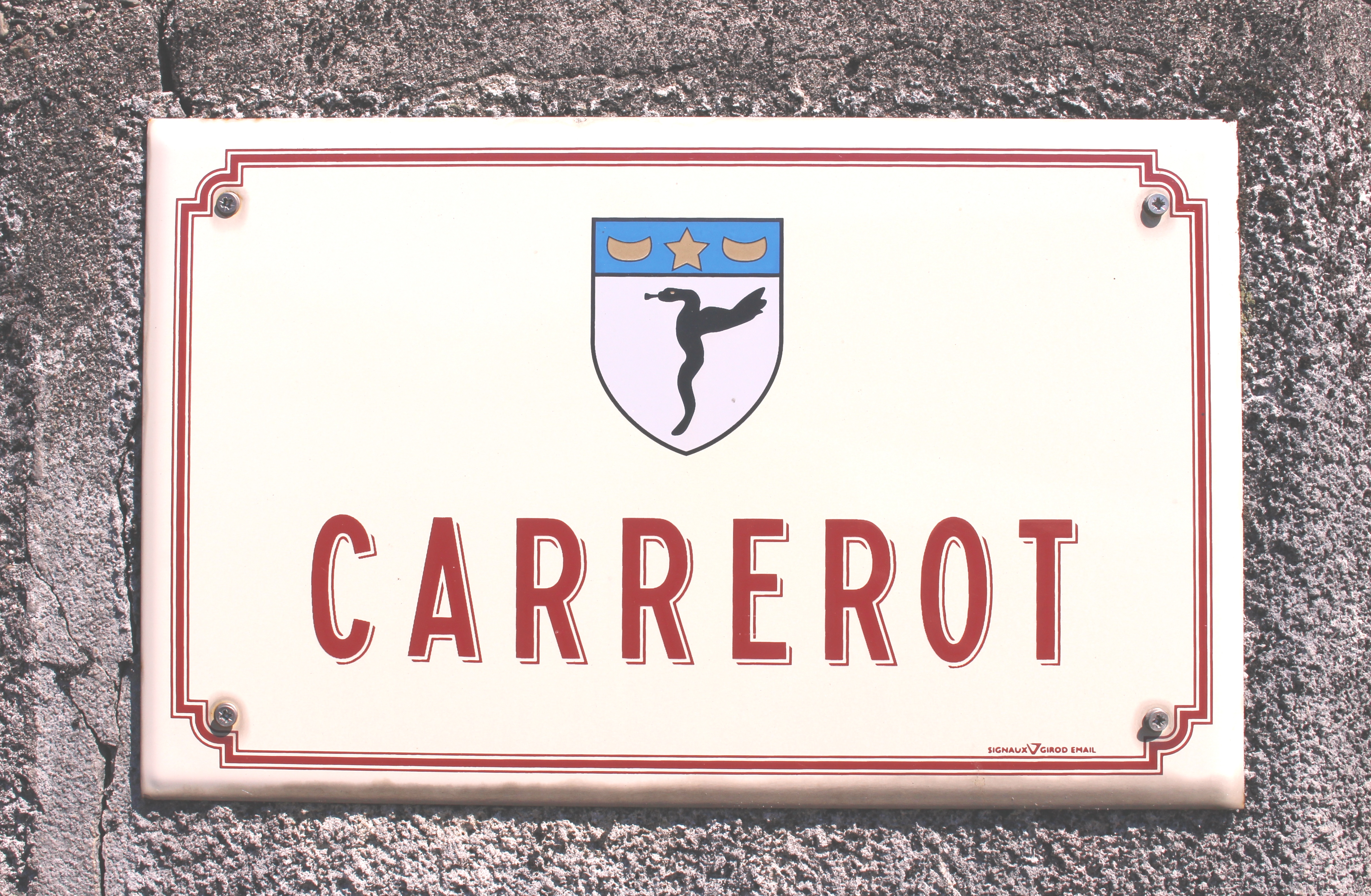 Rue du village de Hiis (Hautes-Pyrénées)